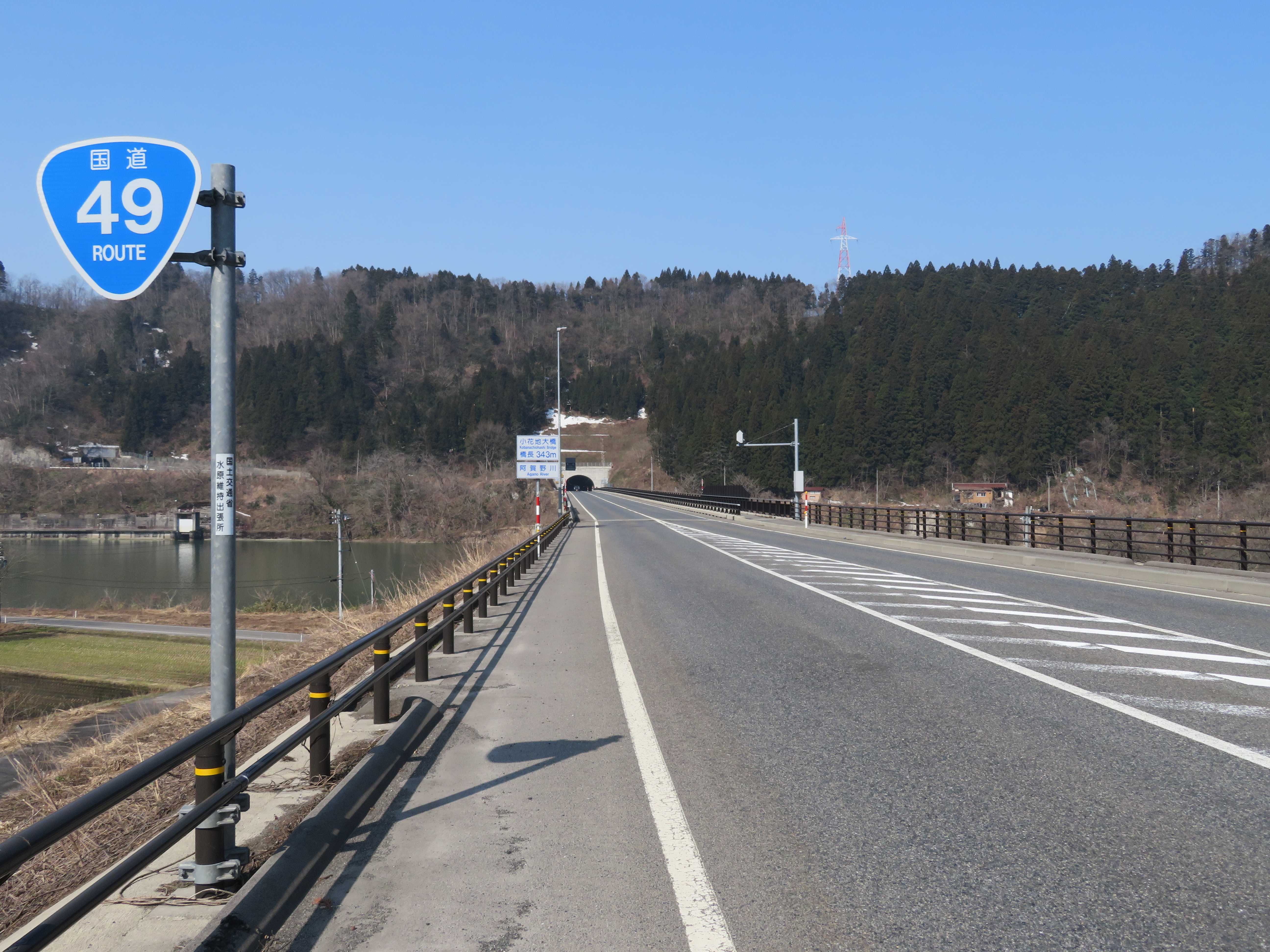 国道49号線新潟県阿賀町 小花地大橋付近（東側より撮影）